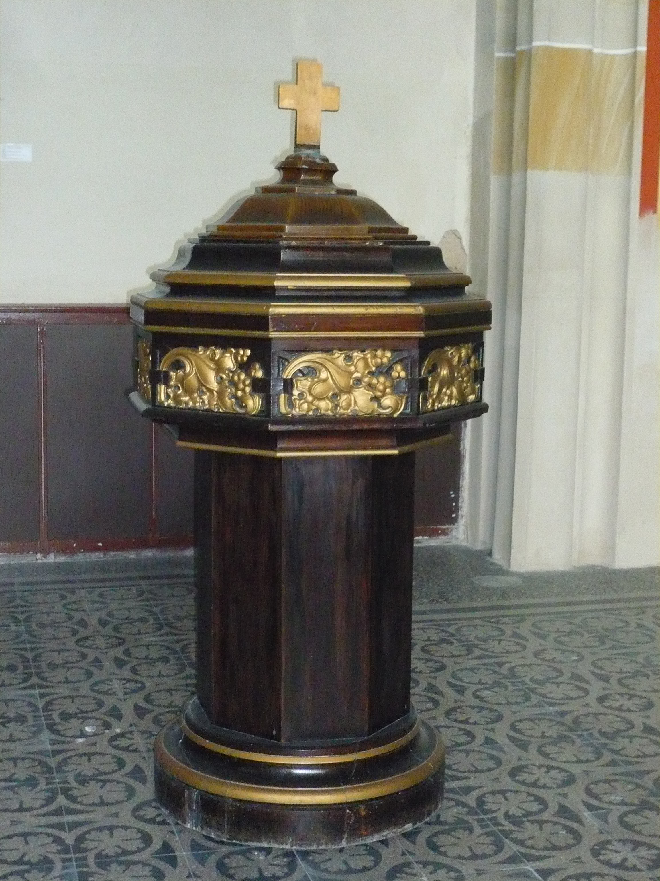 Ortsteil Friedrichshain: Pfingstkirche, Taufbecken